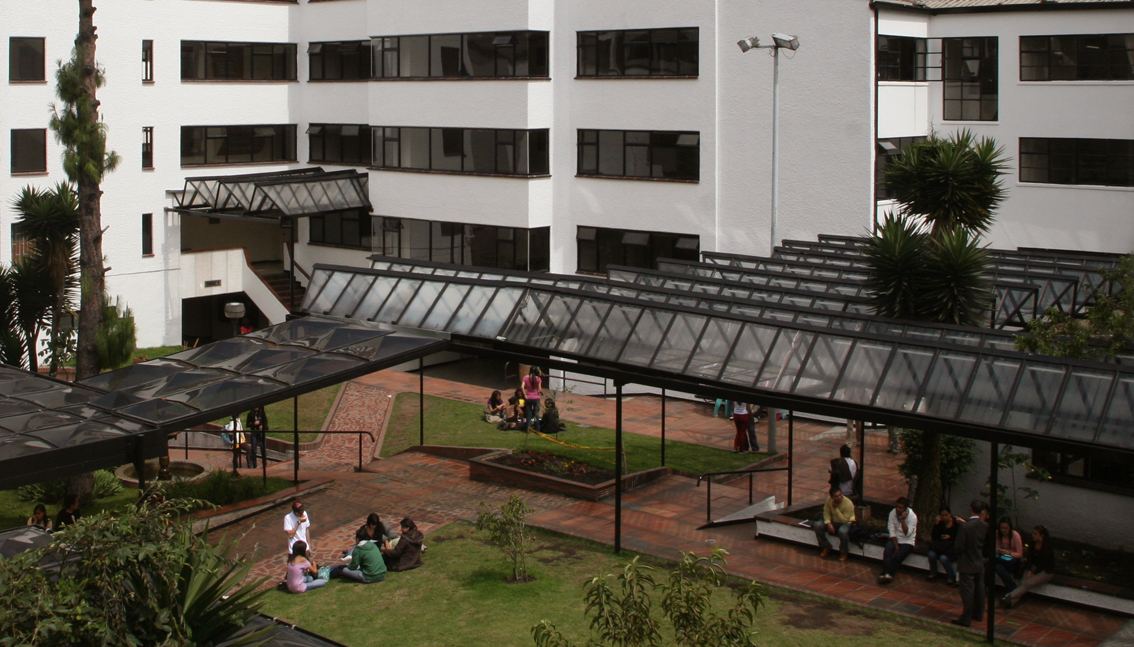 Contaduria de la Universidad Central